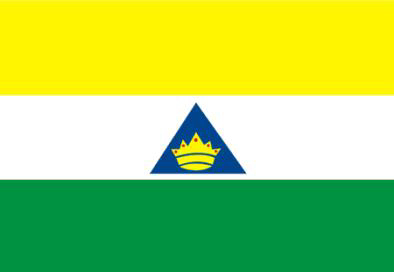 Flag of Imperatriz city in Maranhão, Brazil. All the images of Brazilian states' flags and coat of arms (official symbols) are in public domain. Bandeira de Imperatriz no estado do Maranhão, Brasil. Todas as imagens de bandeiras de estados brasileiros e brasões (símbolos oficiais) estão em domínio público.